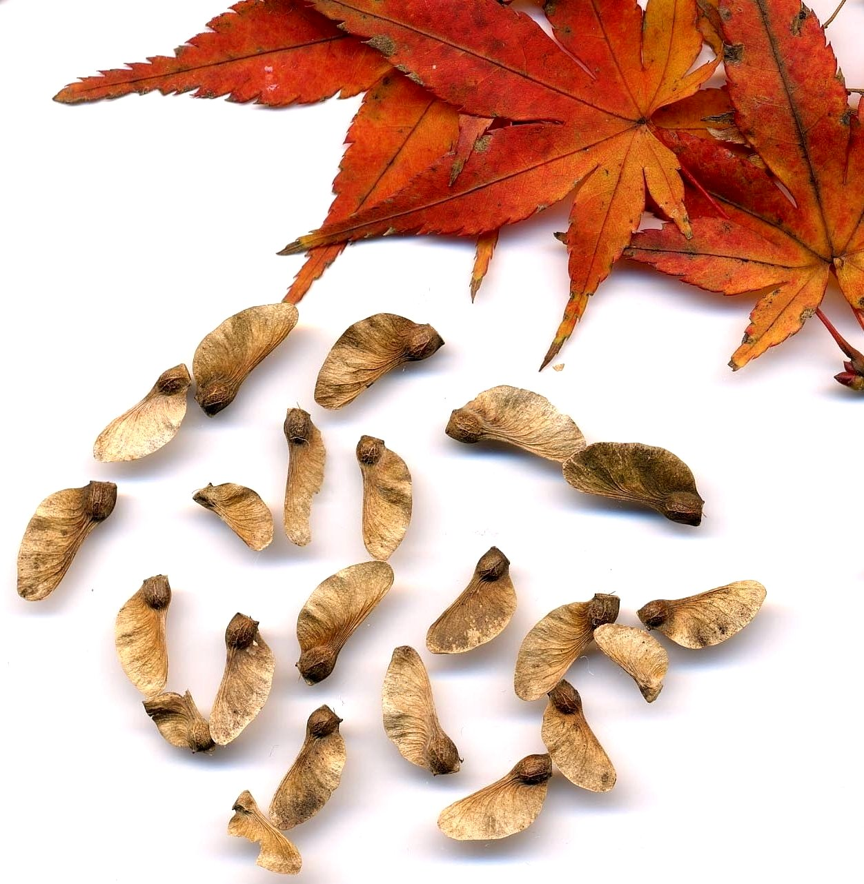 Acer palmatum seed